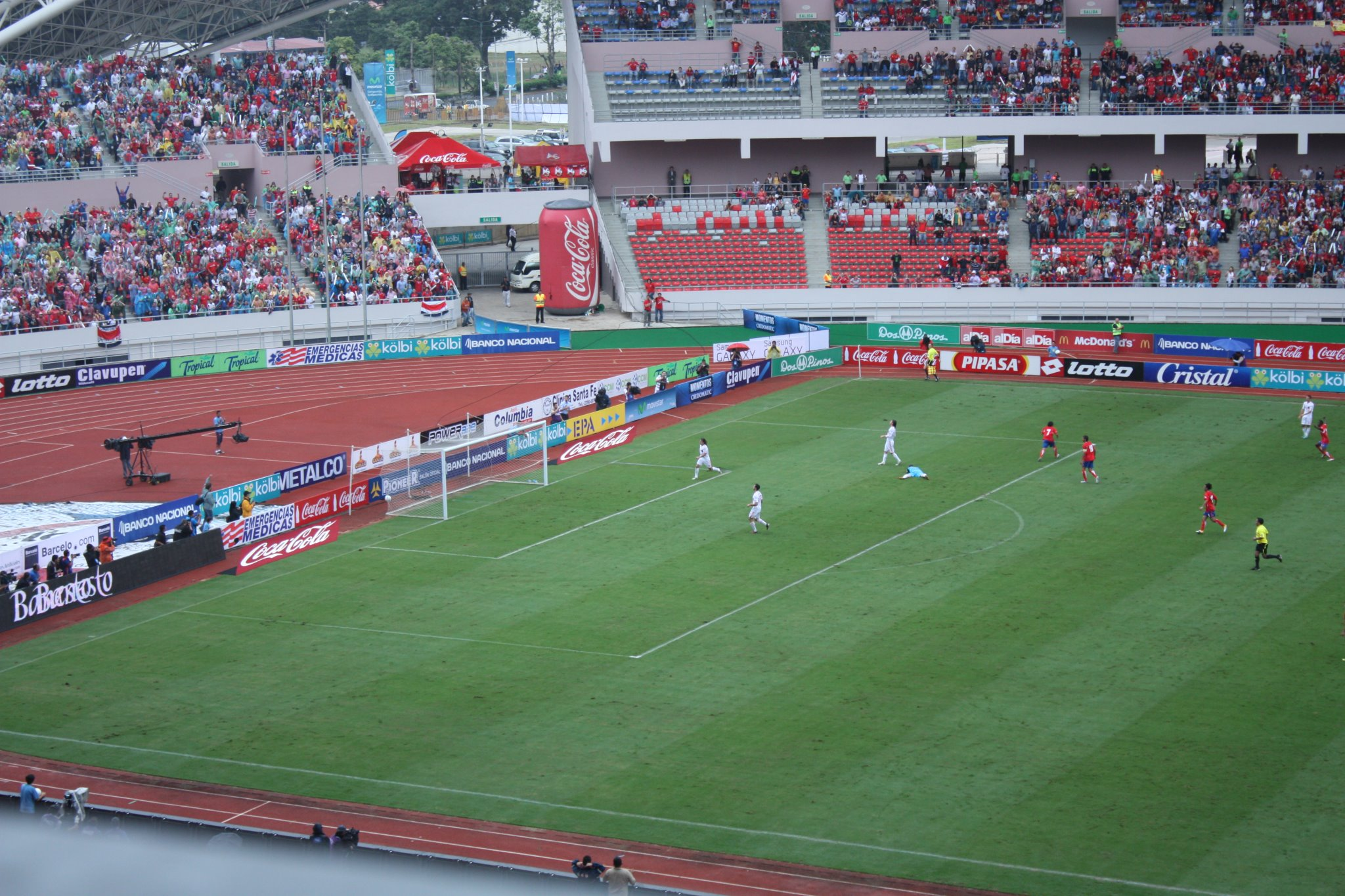 En un espectacular partido, la selección de fútbol de España empató ante la selección de fútbol de Costa Rica en el Estadio Nacional de Costa Rica. Ambos equipos anotaron dos goles, sin embargo España se llevó el espectáculo al anotar sus dos goles en los últimos minutos de partido.